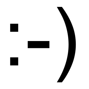 Binette typographique à l'origine du smiley